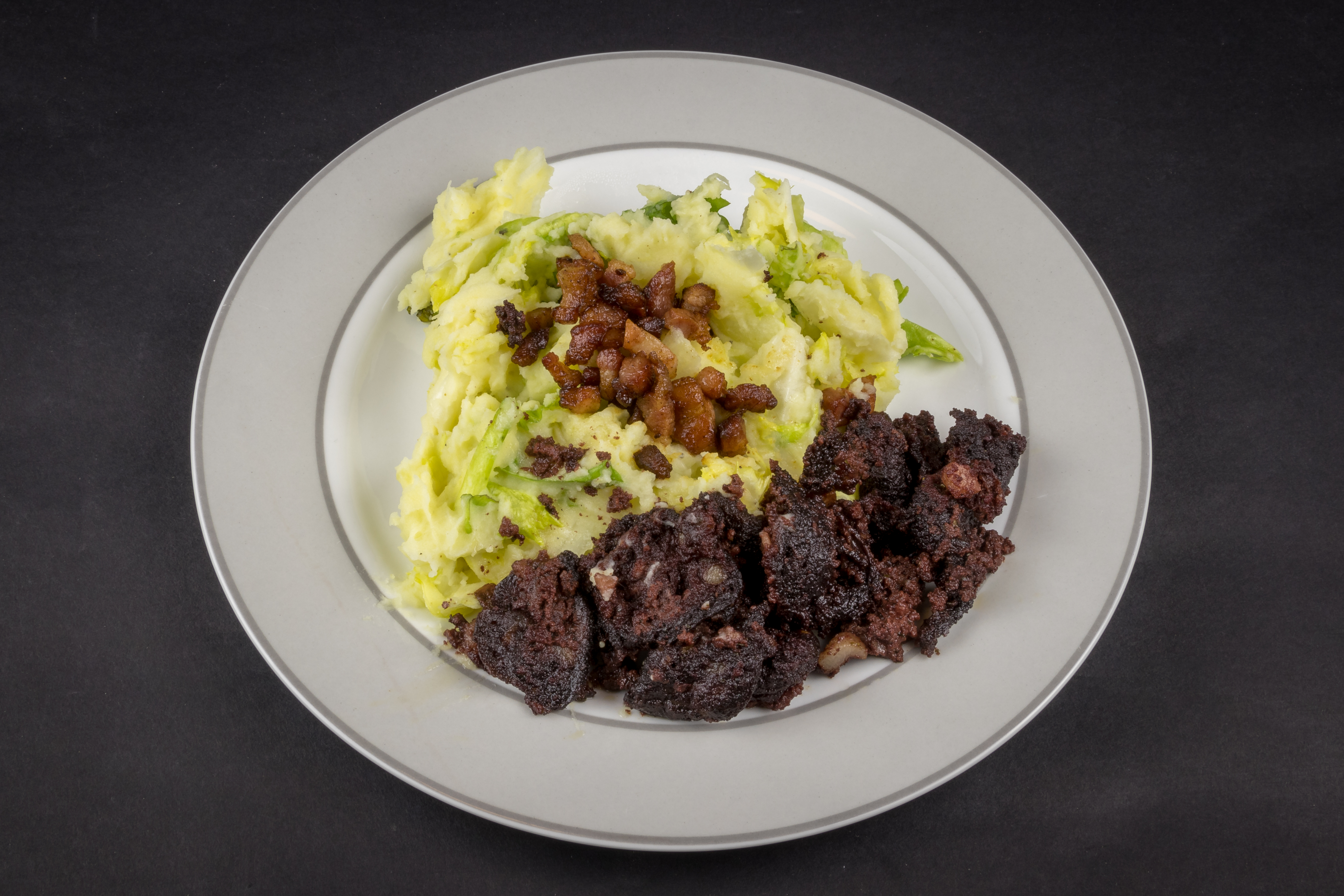 Endivienjemangs met Blootwoosch - Kartoffelstampf und Endiviensalat untereinander mit gebratener Flönz und Speck